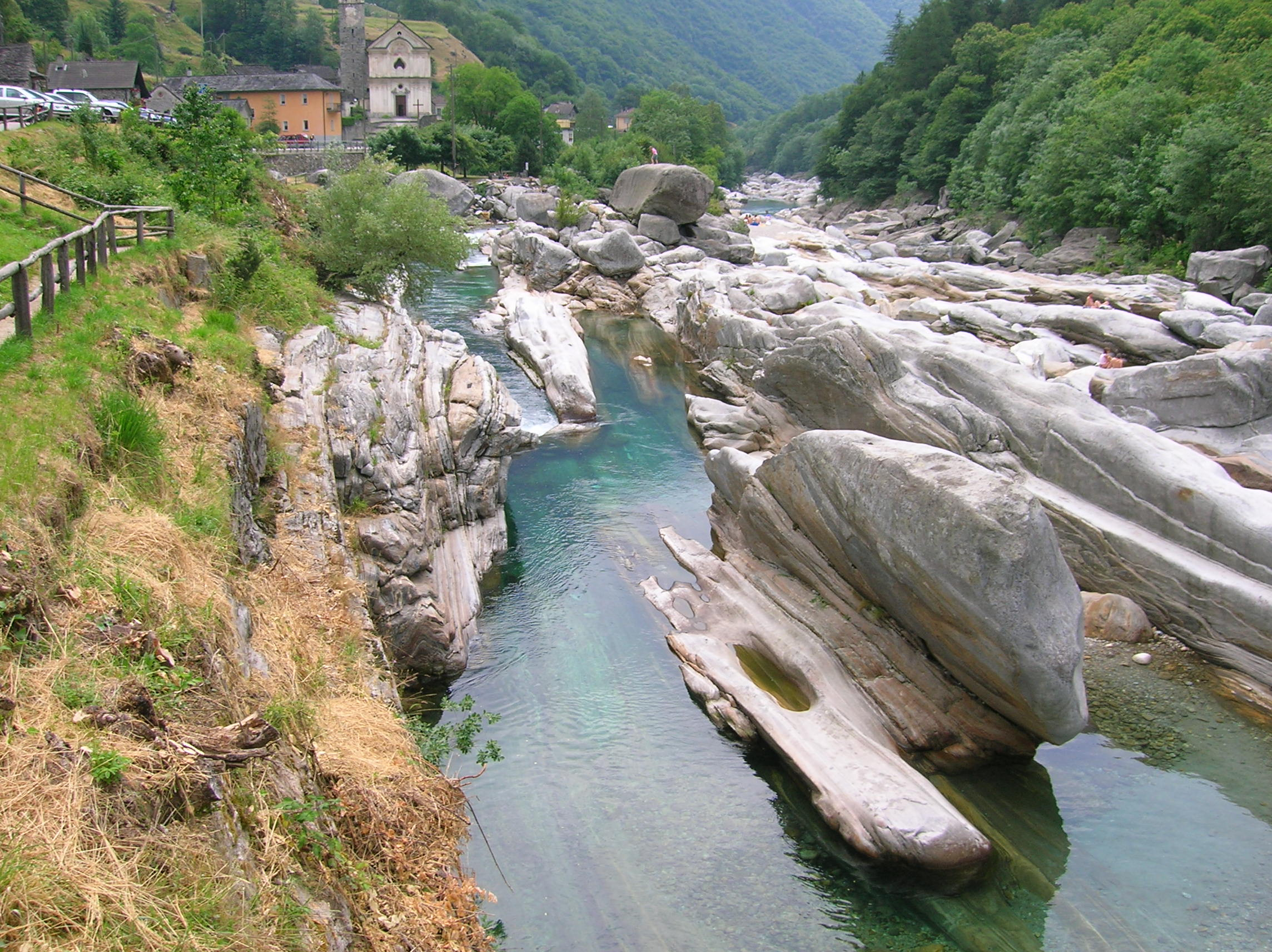 Fiume Verzasca a Lavertezzo